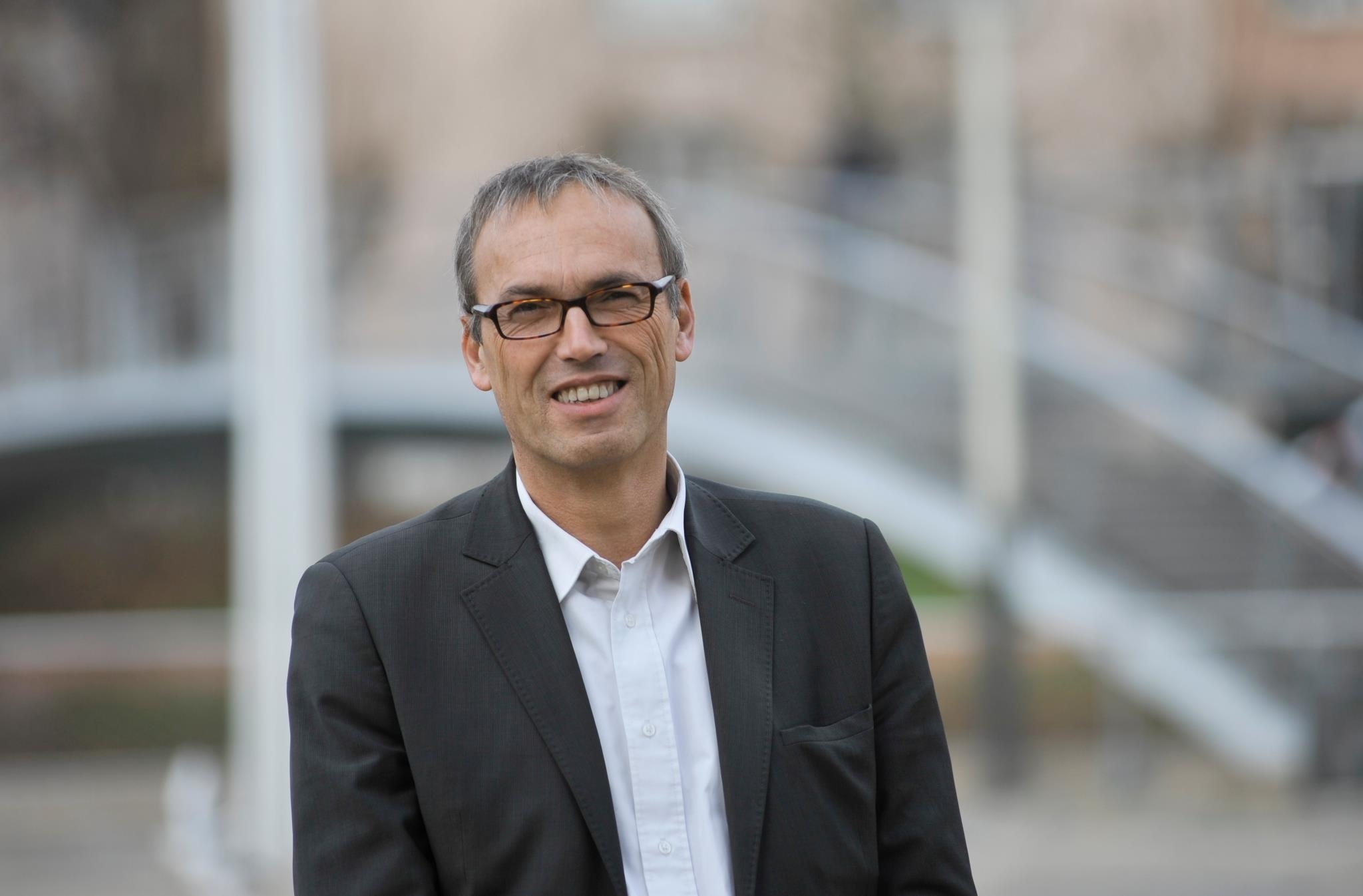 Philippe Bies, né le 14 janvier 1964 à Saint-Avold, est un homme politique strasbourgeois, membre du Parti socialiste. Il est élu député de la deuxième circonscription du Bas-Rhin lors des élections législatives de 2012.